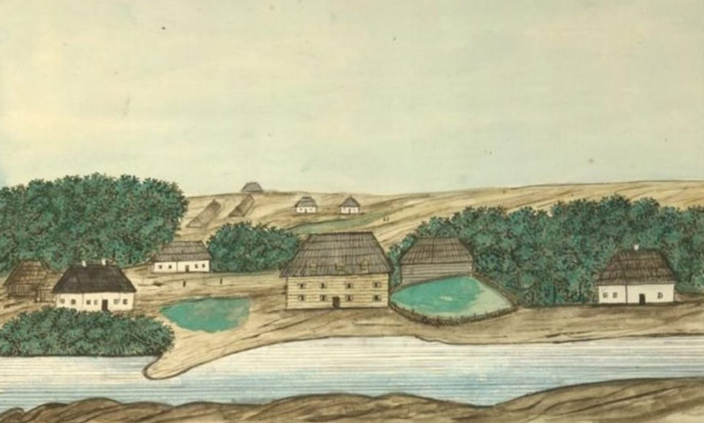 Краєвид села Нижня Либідь-Деміївка Хотівського товариства Київського повіту - на річці Либідь. З альбому етнографа Домініка П'єра Де ля Фліза "Медико-топографическое описание государственных имуществ Киевского округа", Киев, 1854 год.